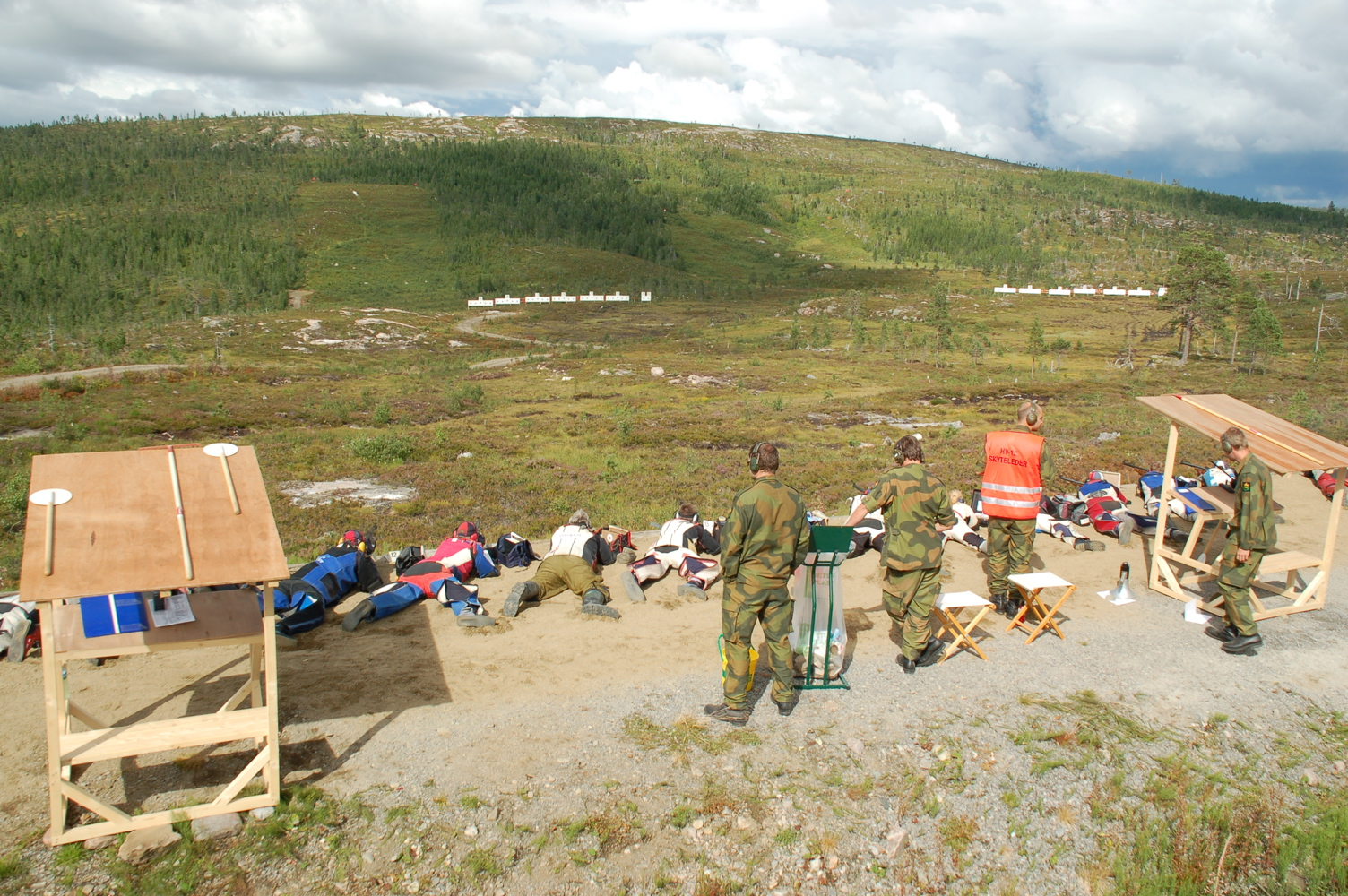 NM feltskyting, LS 2007